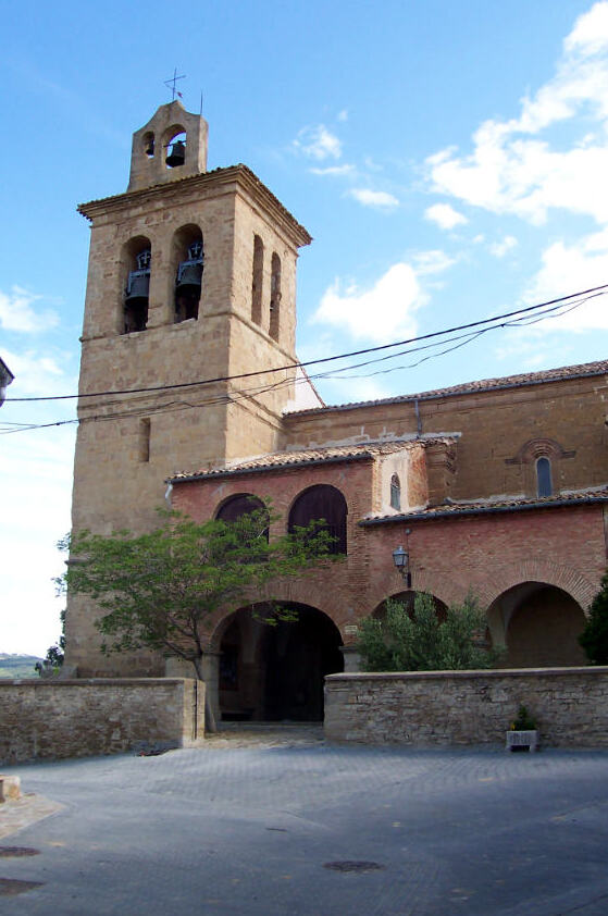 iglesia / kirche / church Asunción de María de uterga, pueblo navarro, navarrisches dorf, navarran village